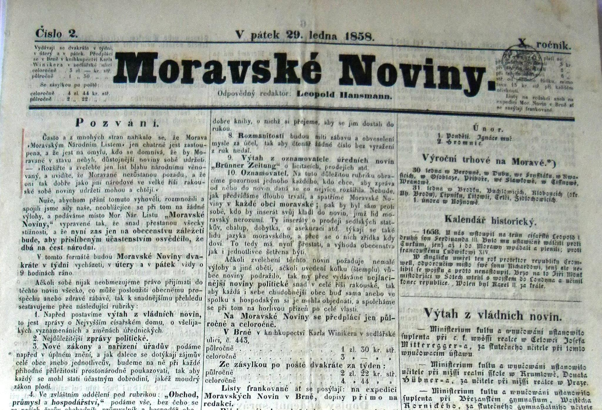 Oskenovaná titulní stránka Moravských novin z 29.1.1858, číslo 2., ročník 10.